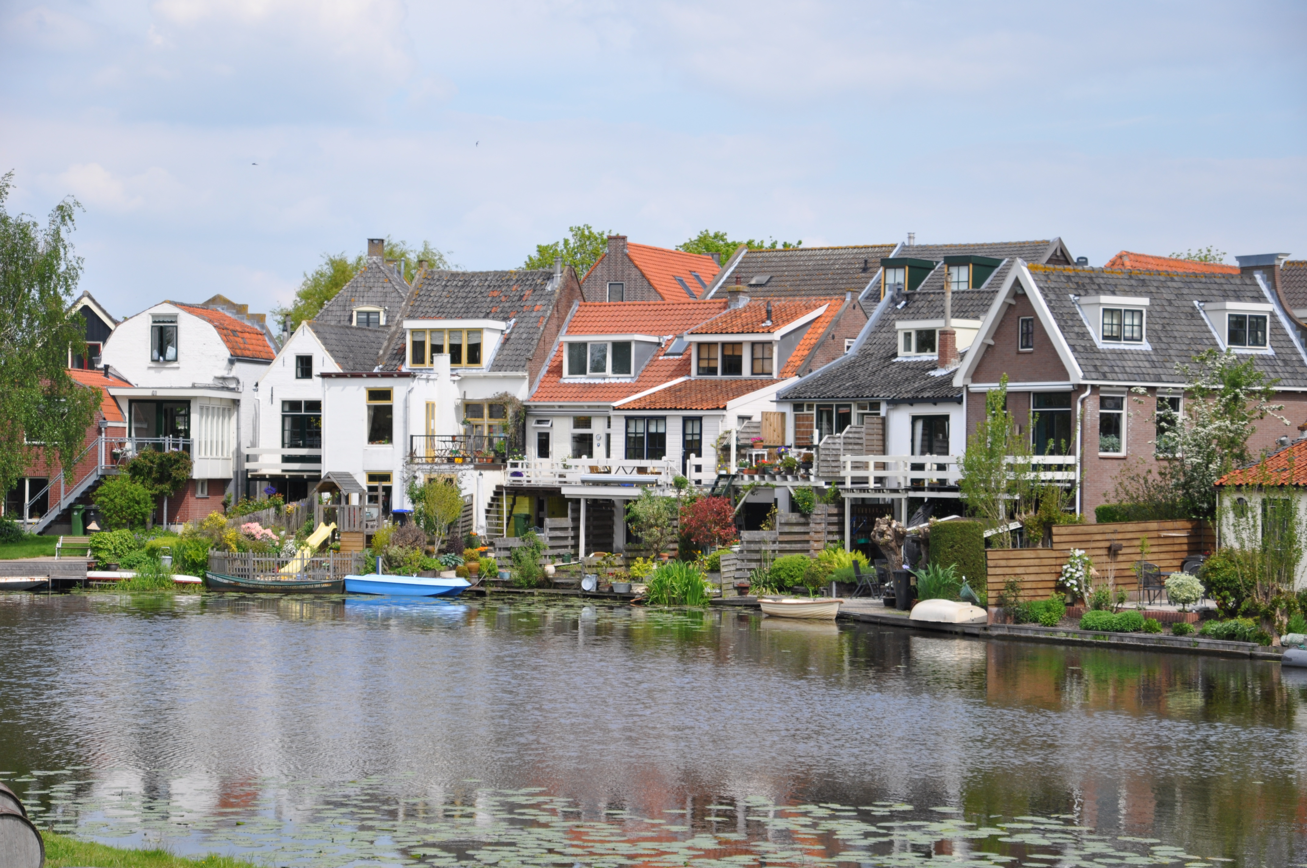 Zicht op Haastrecht en de rivier de Vlist.